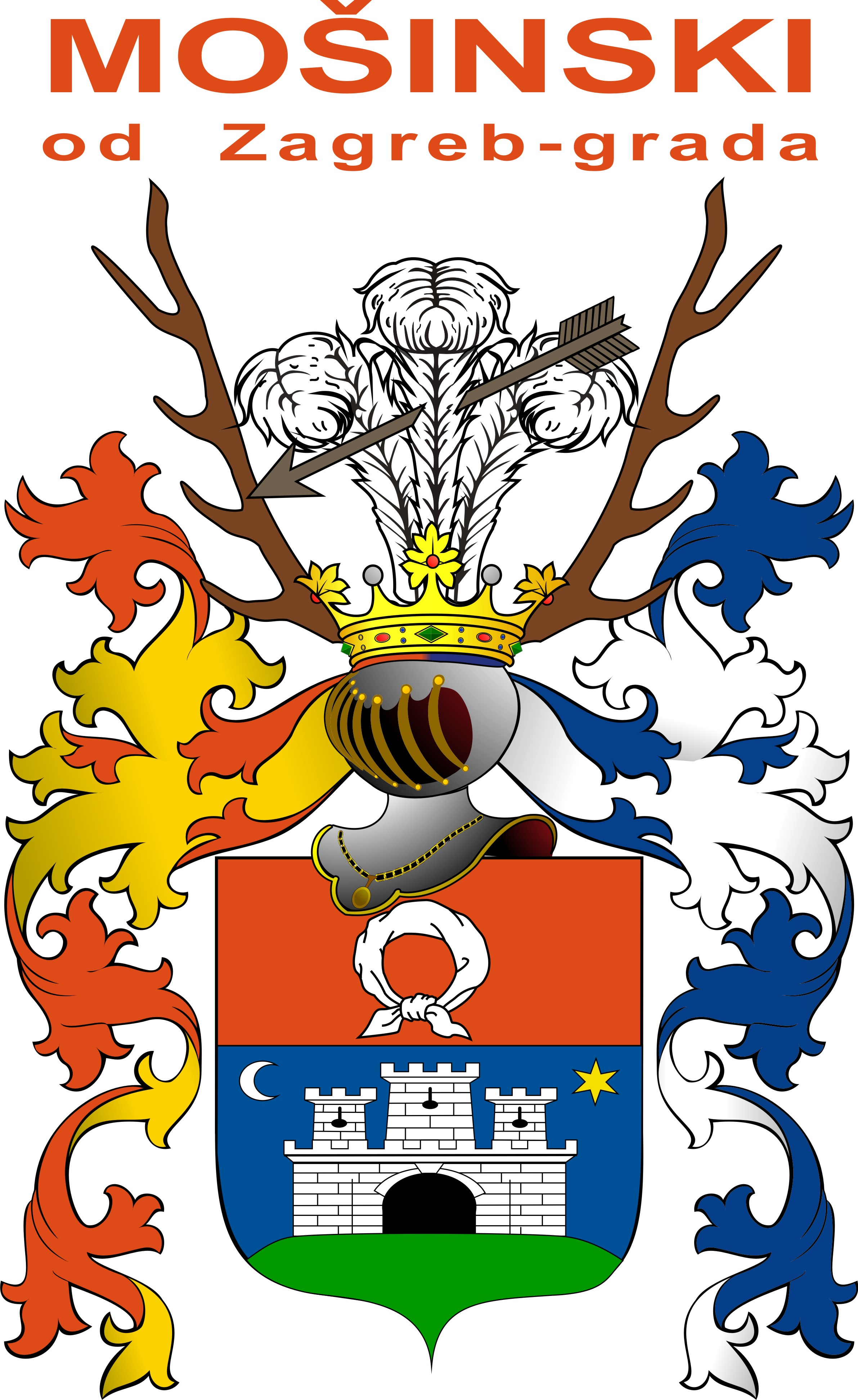 Grb Adolfa Mošinskog prema grbovnici od 25. 03. 1899. godine